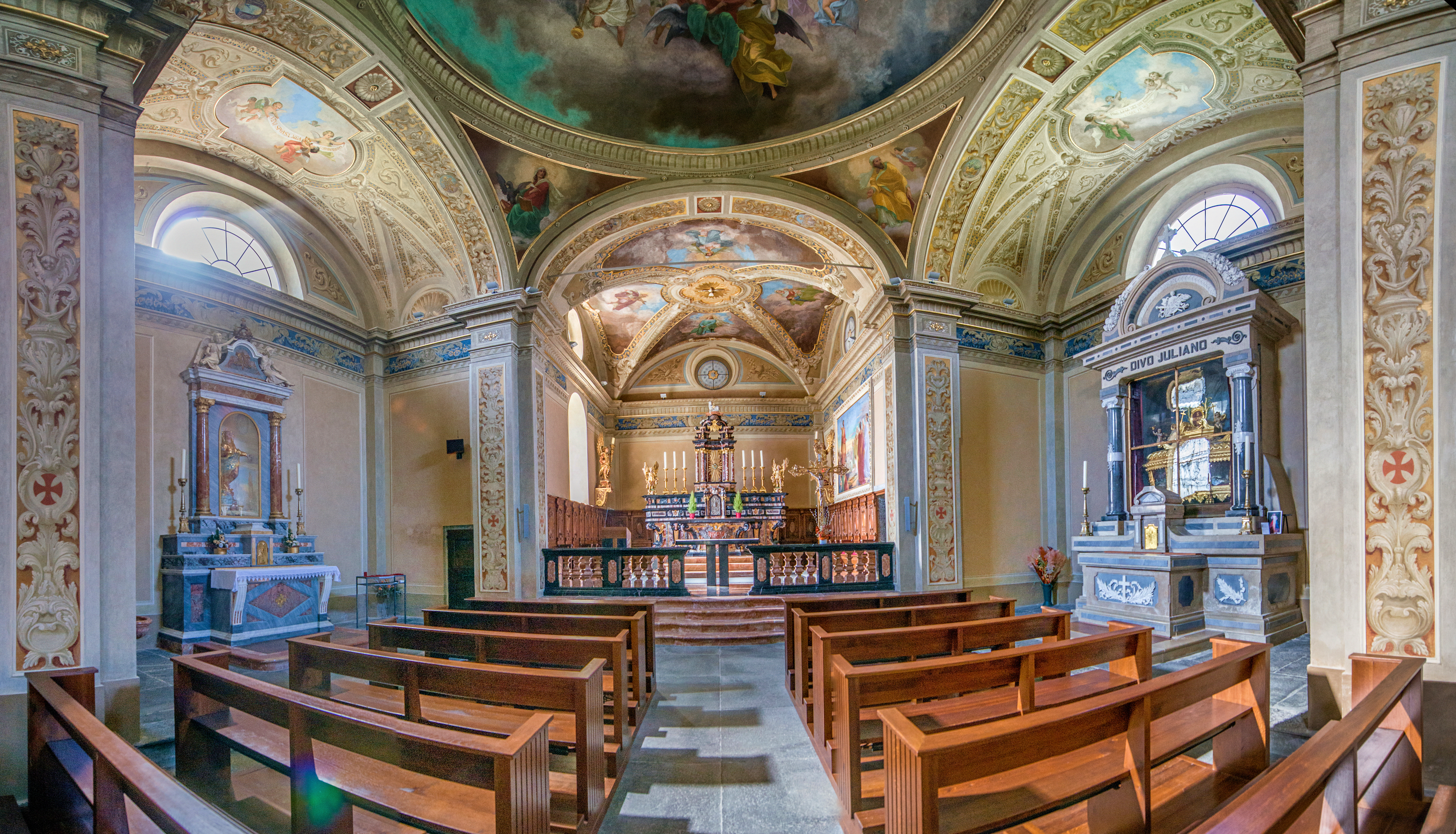 Chiesa di S Maria Assunta e S Giovanni con ossario e portico in Cevio.